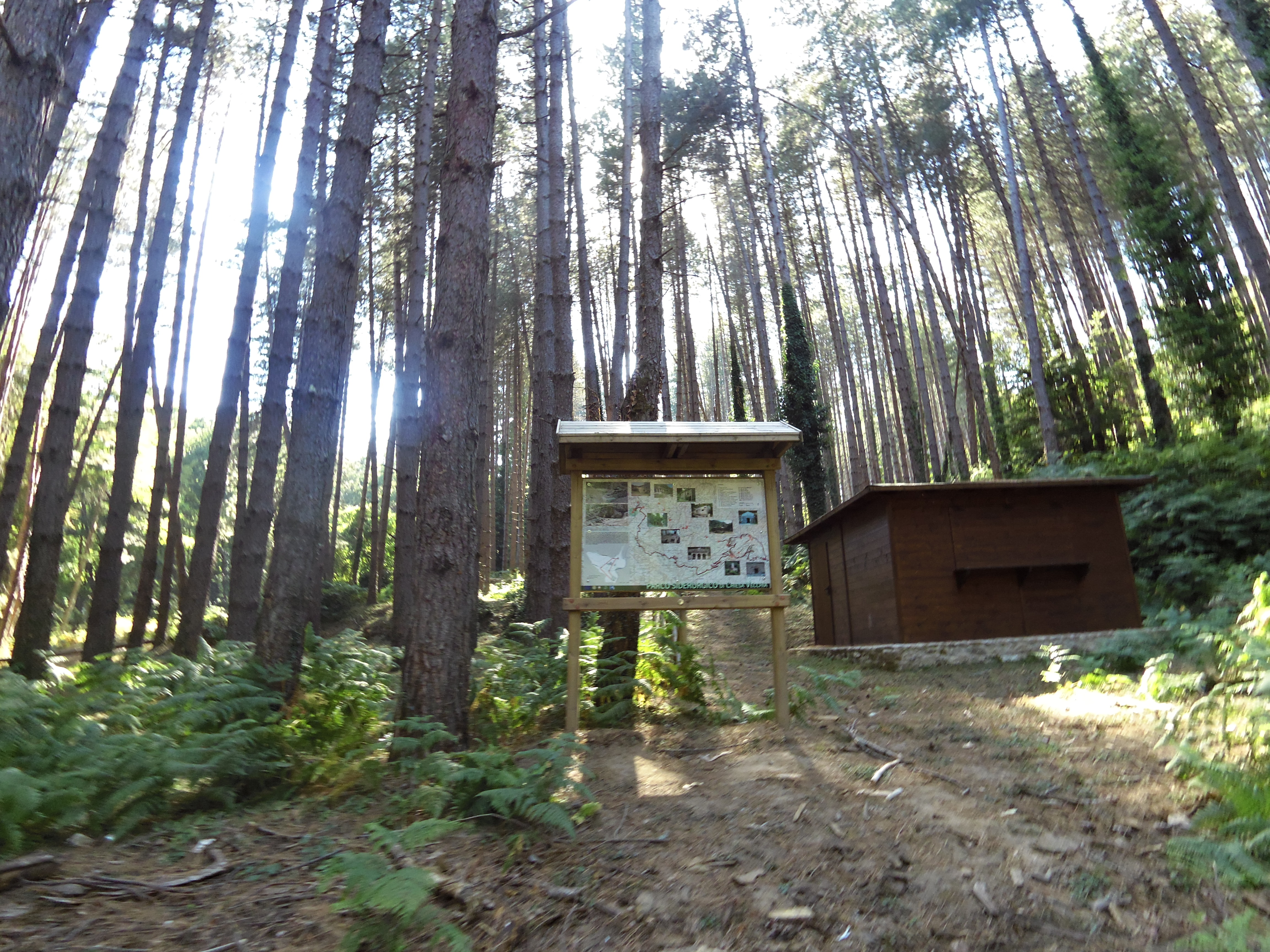 Parco siderurgico di chiesa vecchio - Ingresso con Cartellone